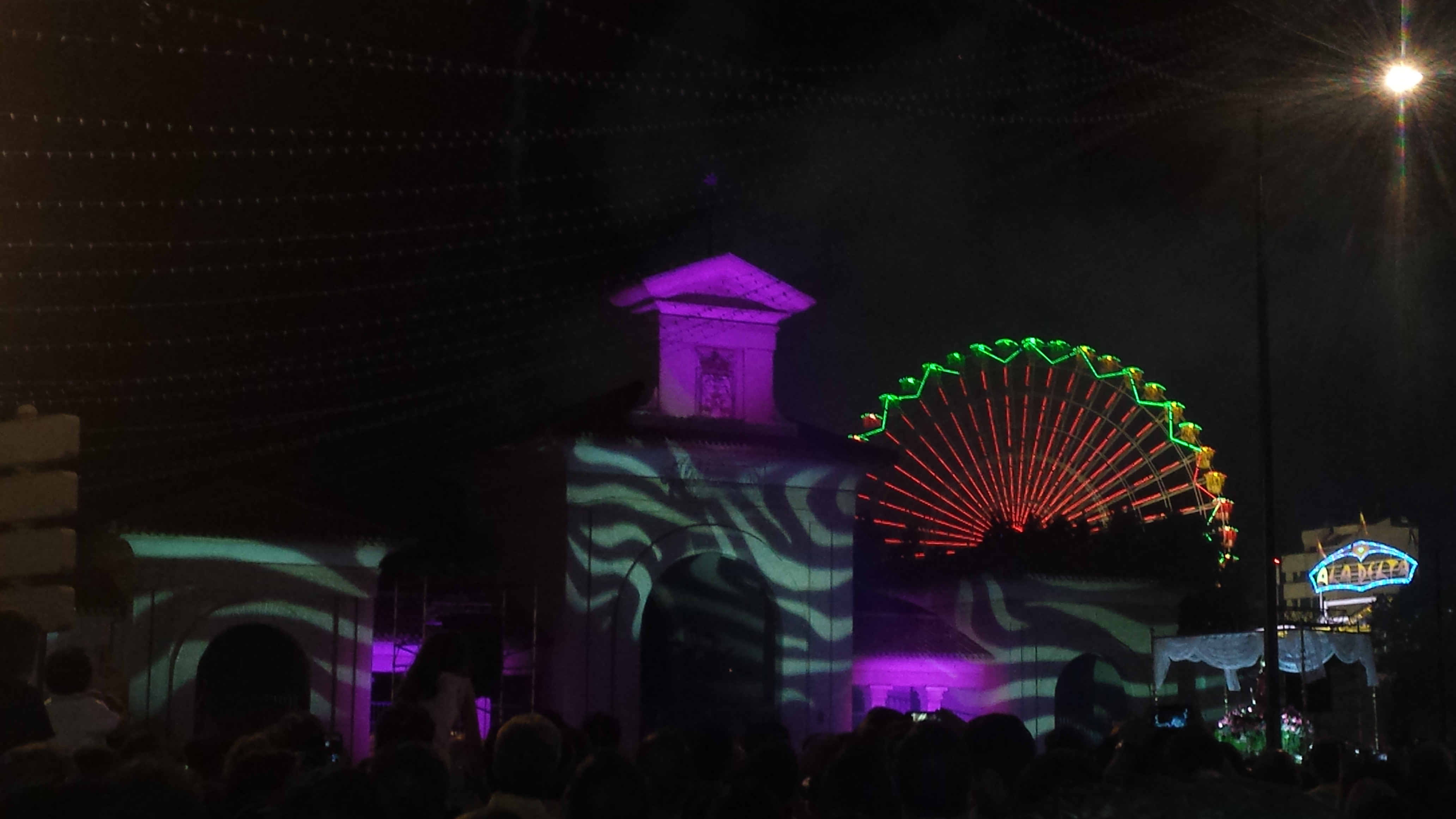 Espectáculo de luz y sonido. Puerta de Hierros del Recinto Ferial de Albacete. Feria de Albacete 2014